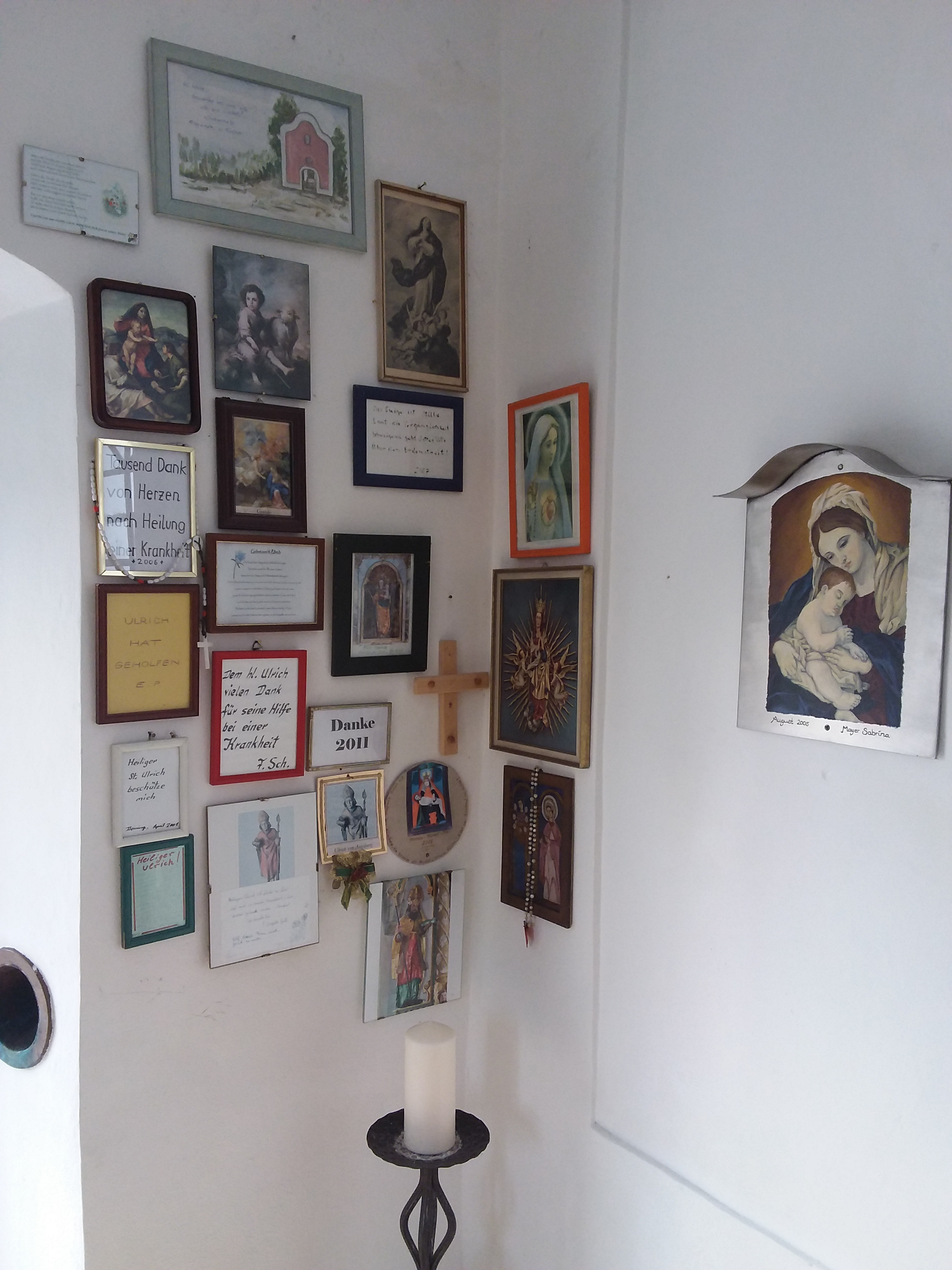 Kapelle St. Ulrich bei der Labermühle, Ortsteil von Deining im Landkreis Neumarkt in der Oberpfalz, Bayern, Votivbilder